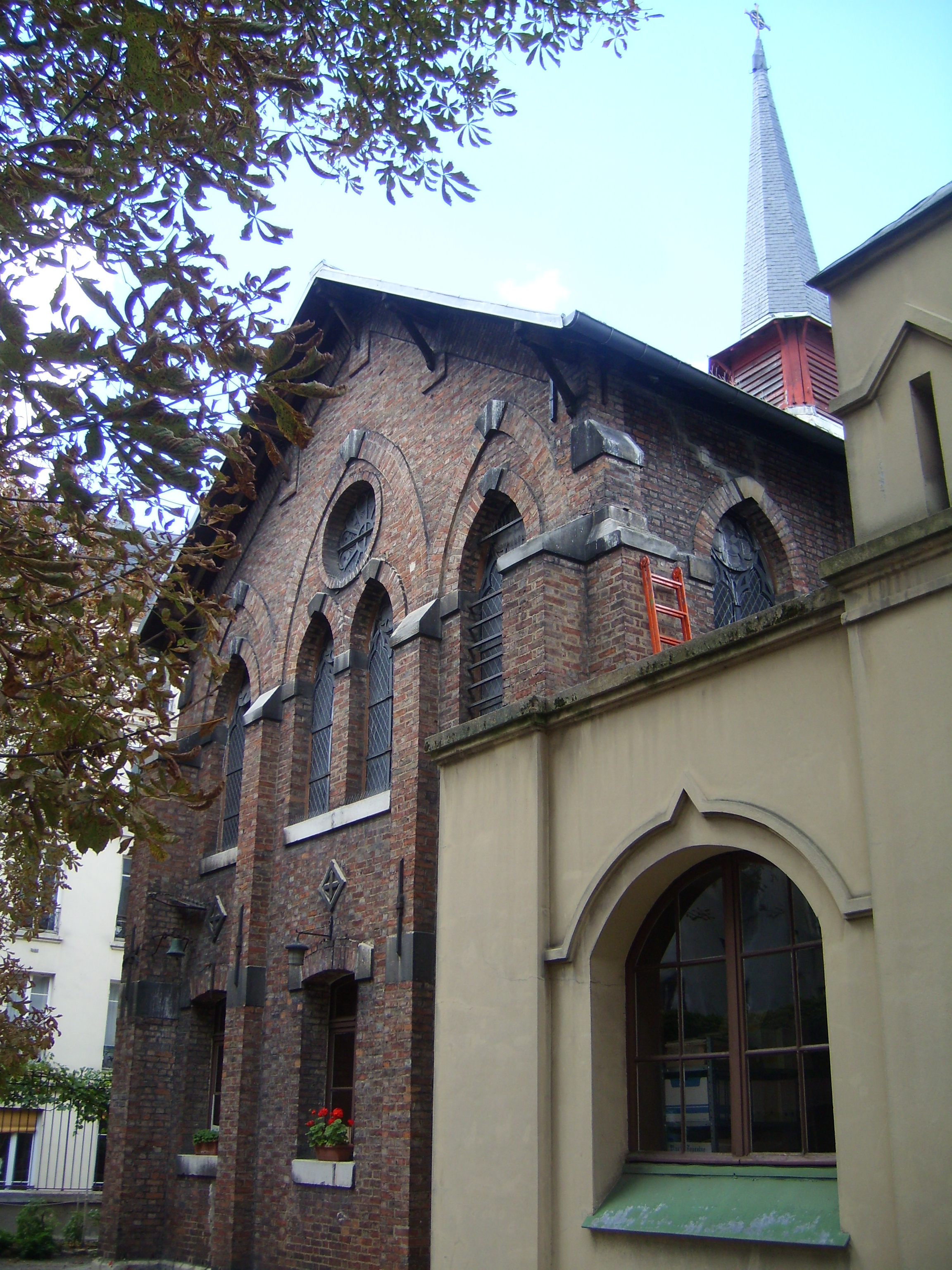 Institut de théologie orthodoxe Saint-Serge de Paris